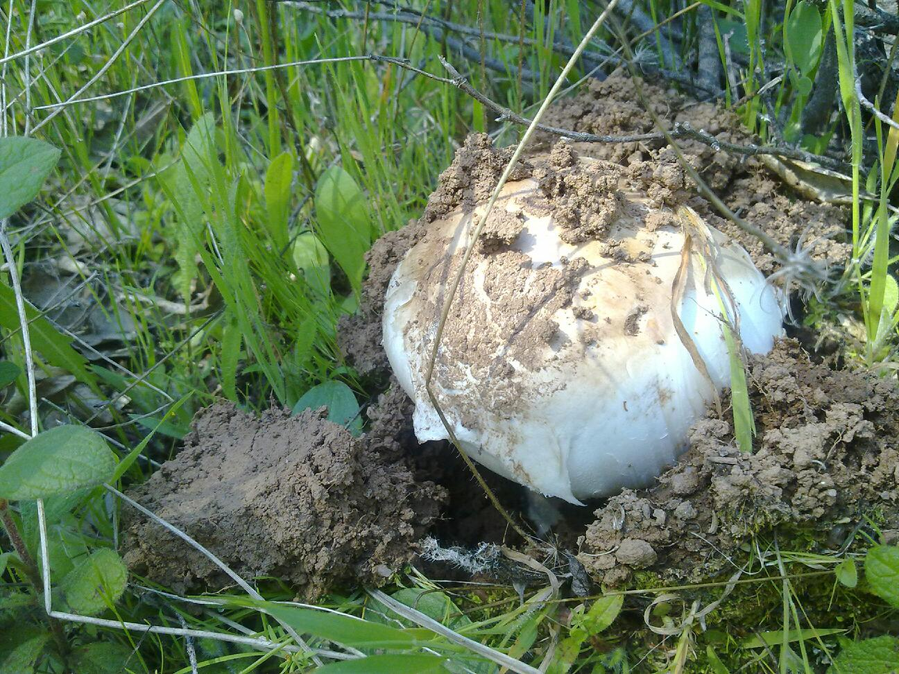 Amanita ponderosa.